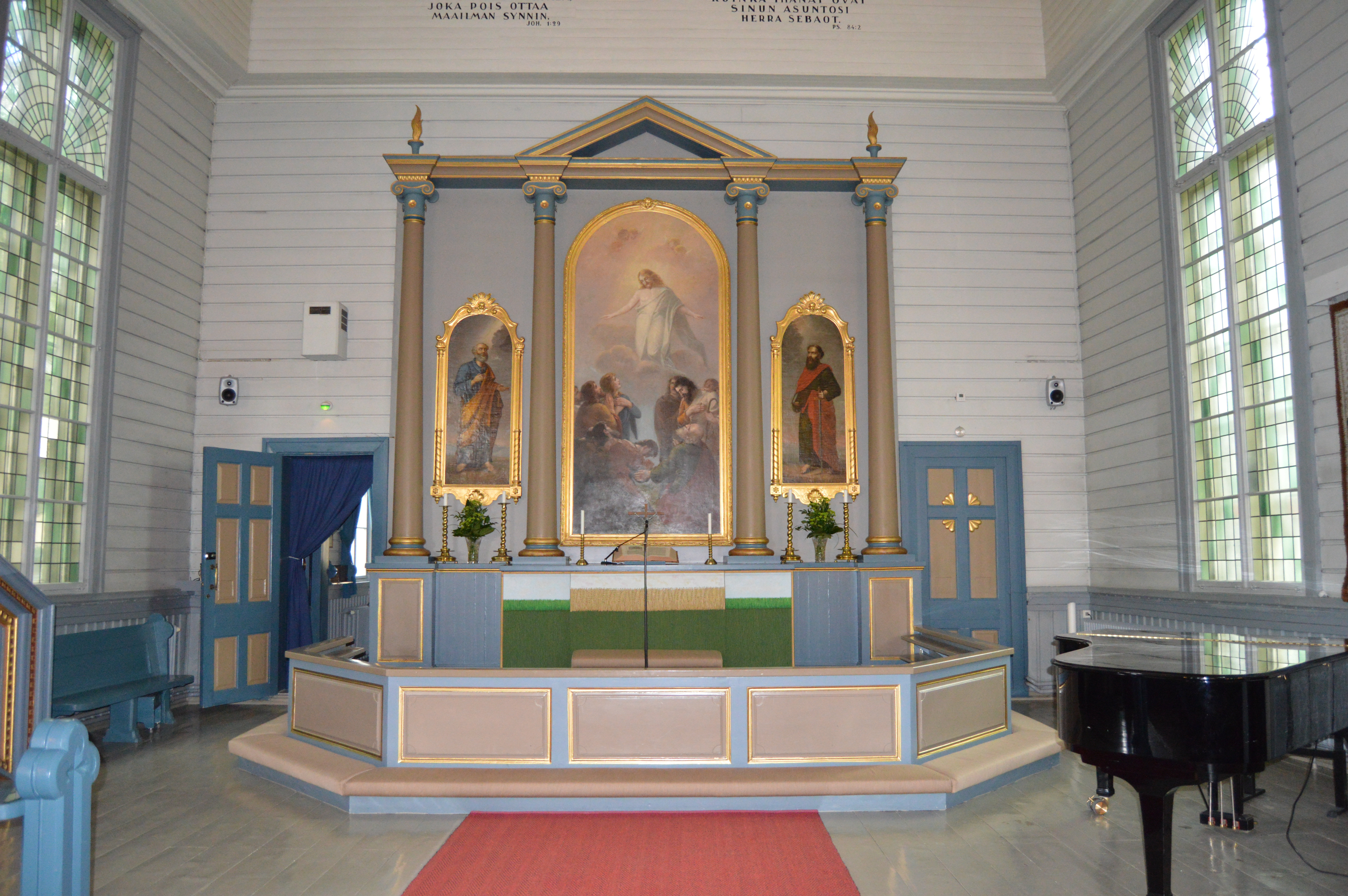 Lappeen kirkon alttari